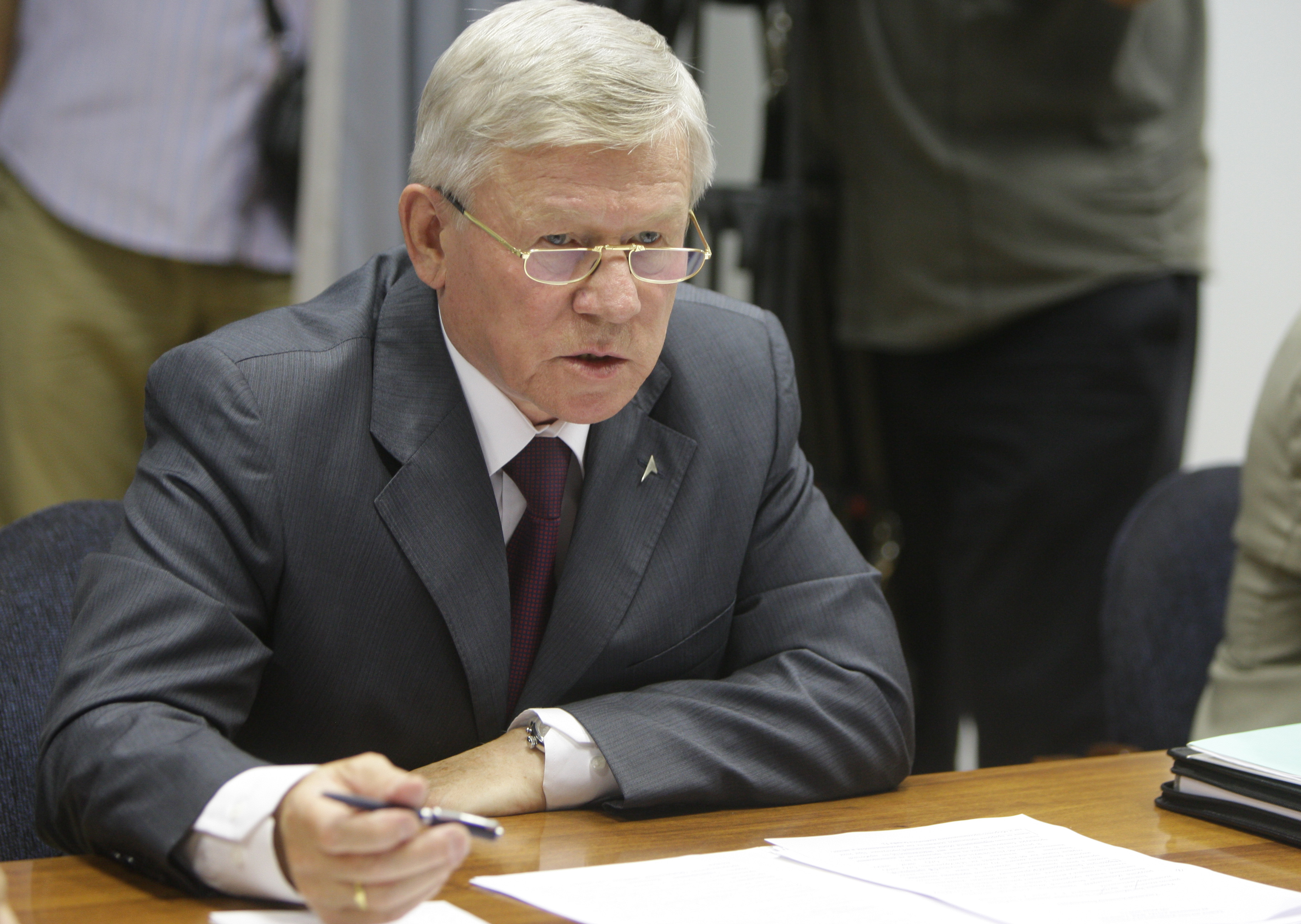 Глава Федерального космического агентства России А. Н. Перминов на совещании в РКК «Энергия»